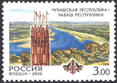 Чувашская Республика — Чаваш Республики.